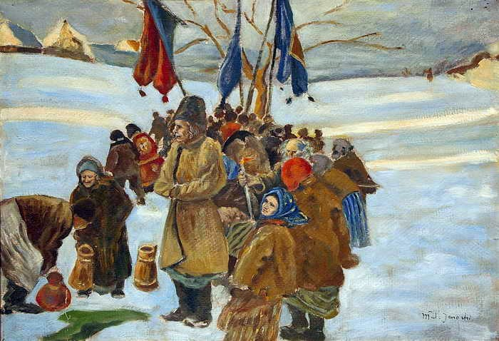 Освящение воды на Громницы. Карпаты, начало XX века